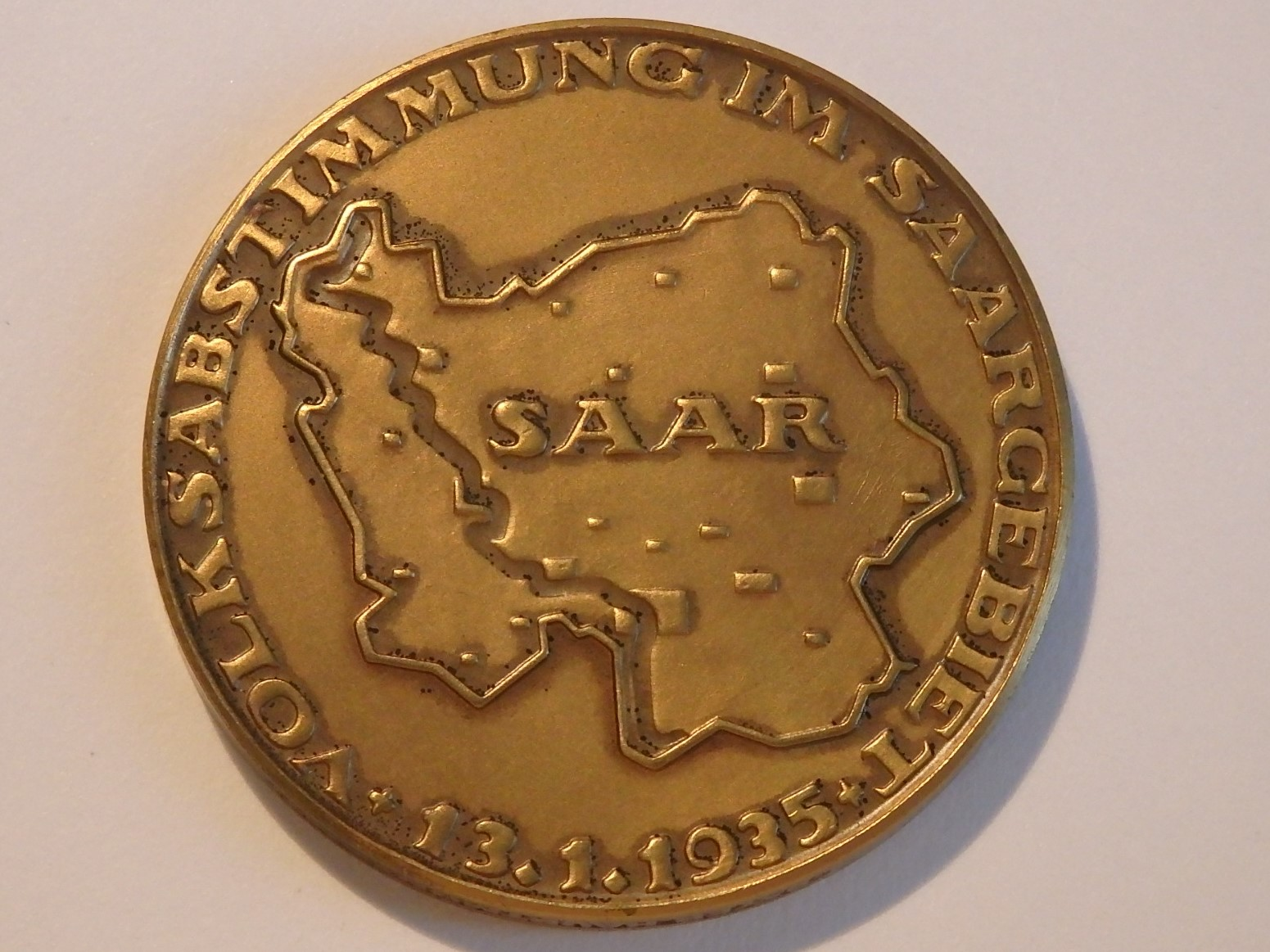 Rückseite der Medaille auf den 13.1.1935